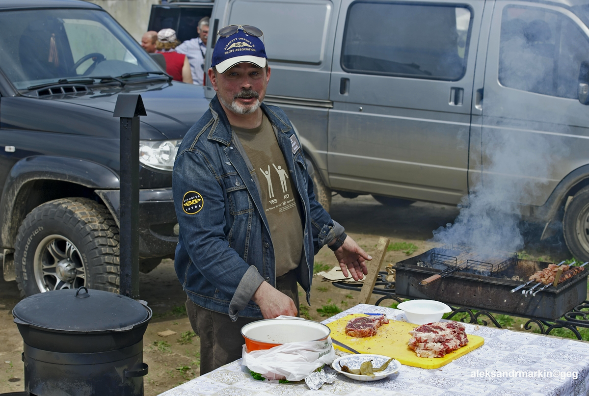 Cook. Pilot R44 Michael Farikh